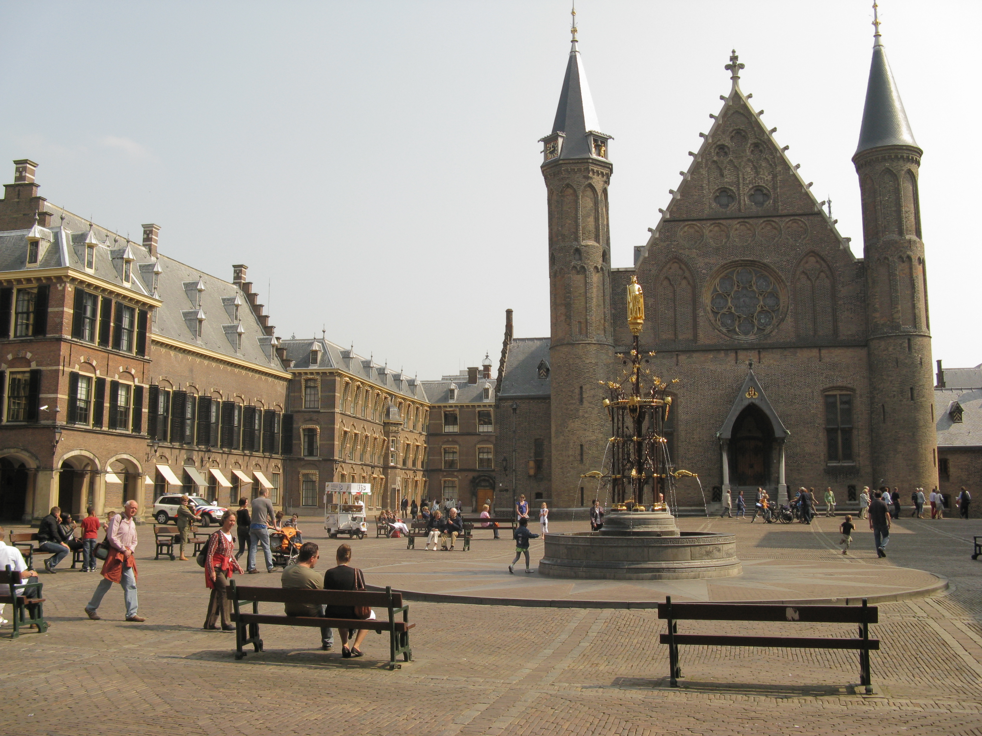 Den Haag, Binnenhof, fontein en Ridderzaal